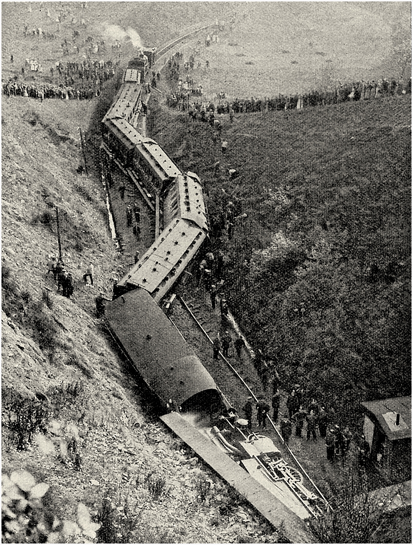 Das Eisenbahnunglück am Büchener Tunnel bei Remscheid